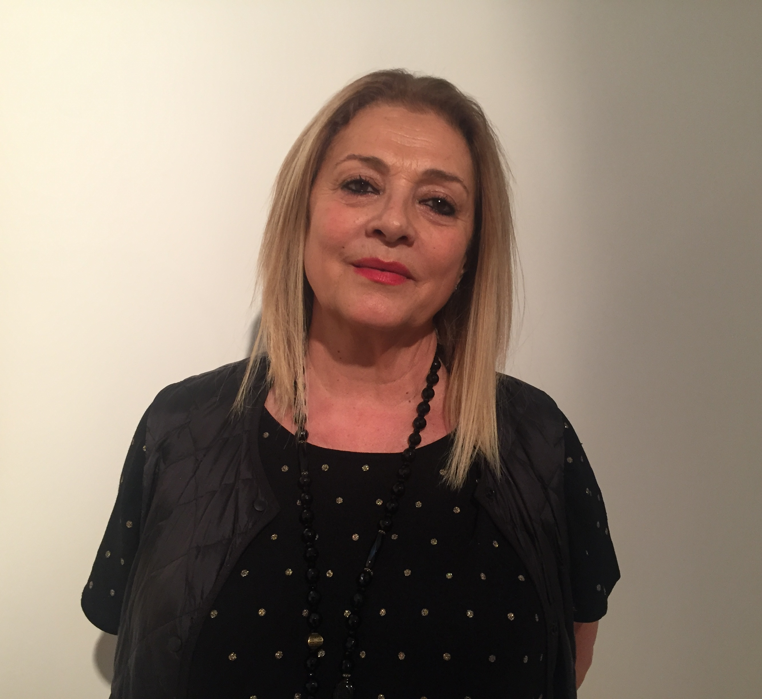 En una inauguración en la Galería Freijo